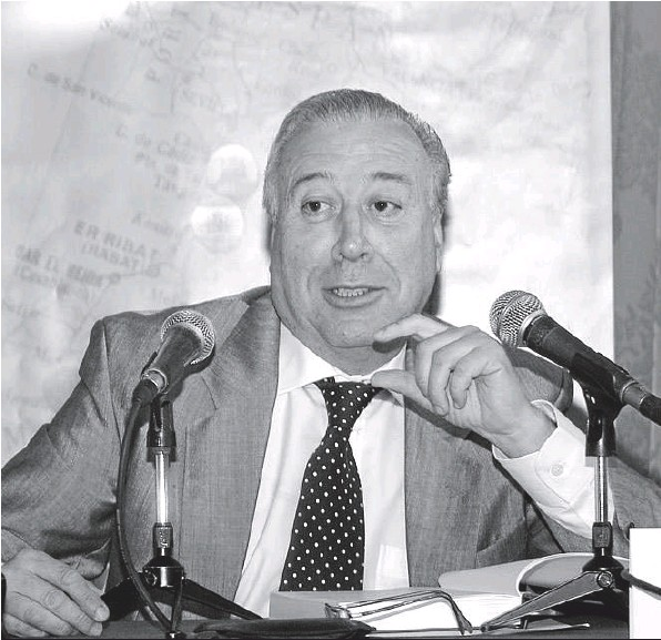 Angel Manuel Ballesteros Garcia, durante la presentación de uno de sus libros.